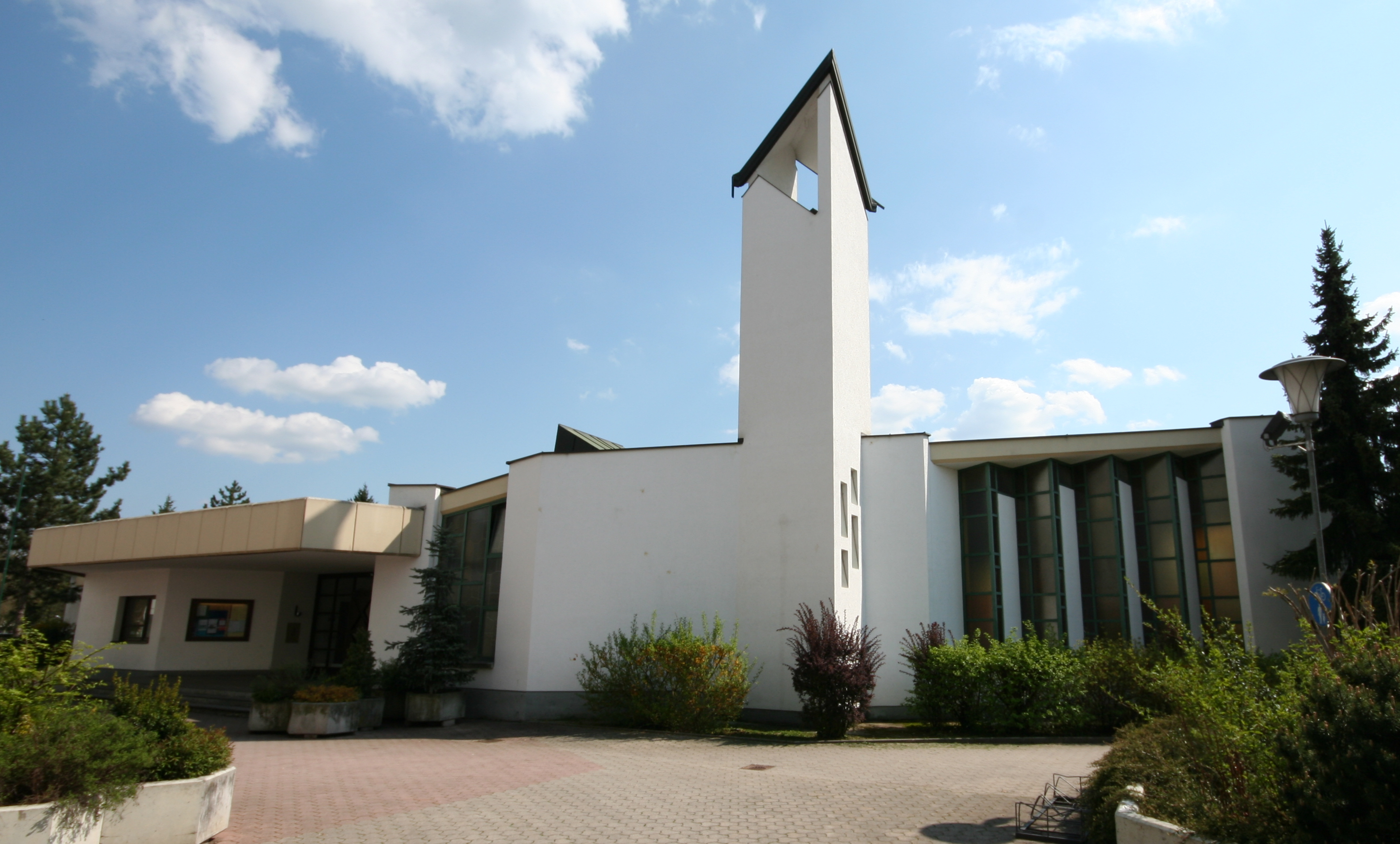 Modestuskirche in Klagenfurt Fischl